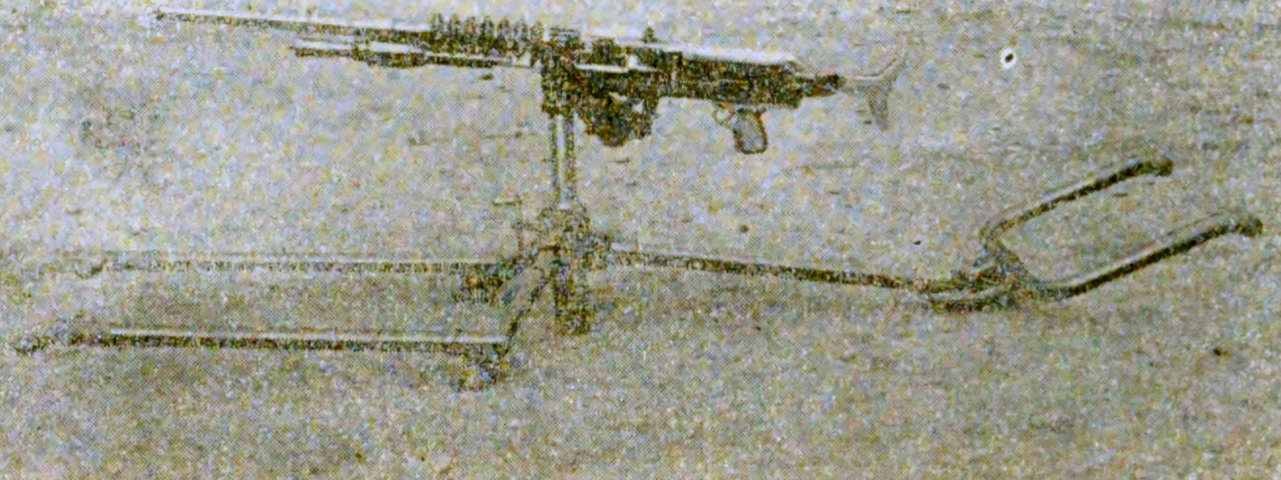 保式機関砲の改良型として開発された三八式機関銃